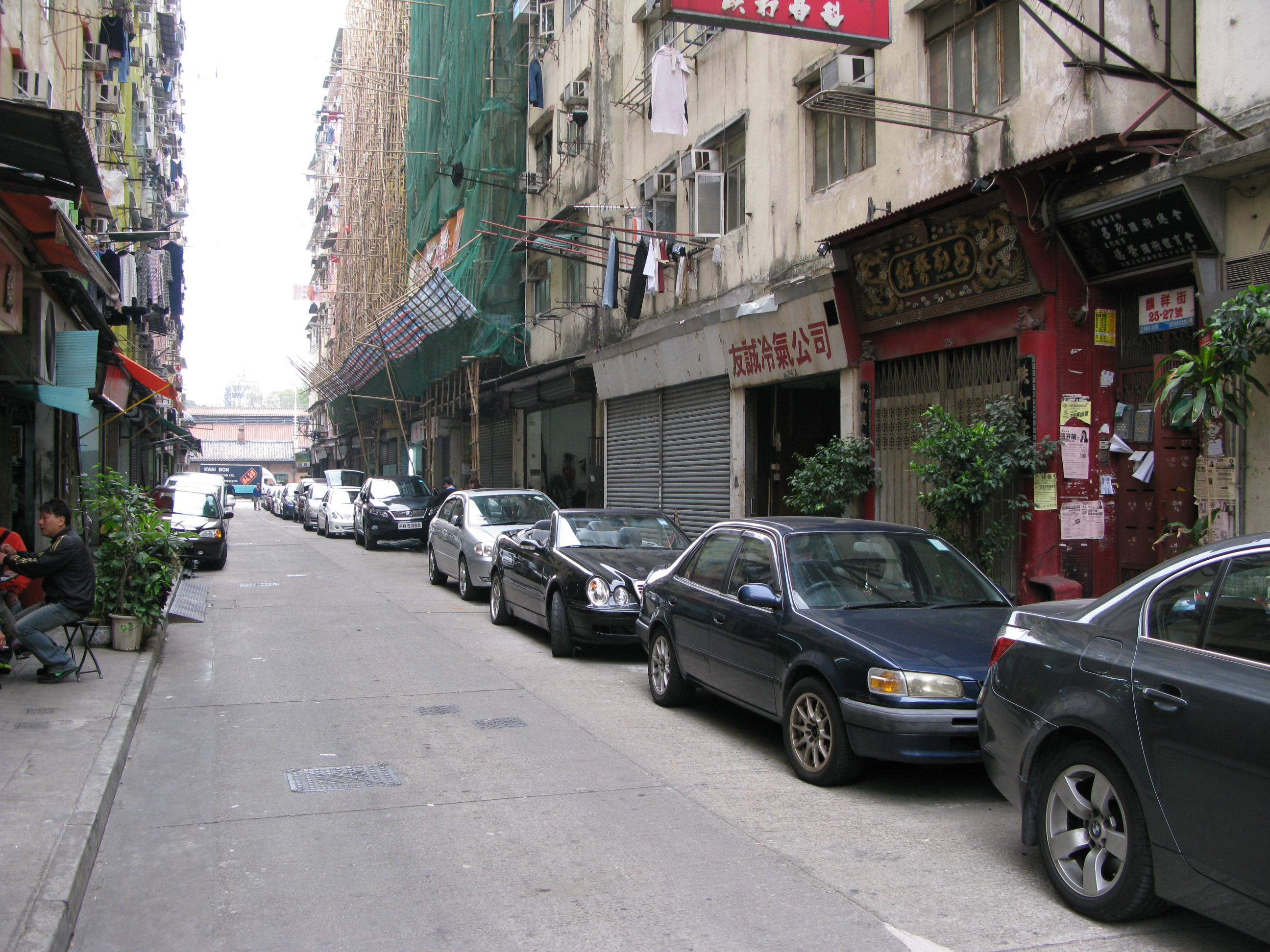 中文（香港）: 香港九龍土瓜灣十三街麟祥街